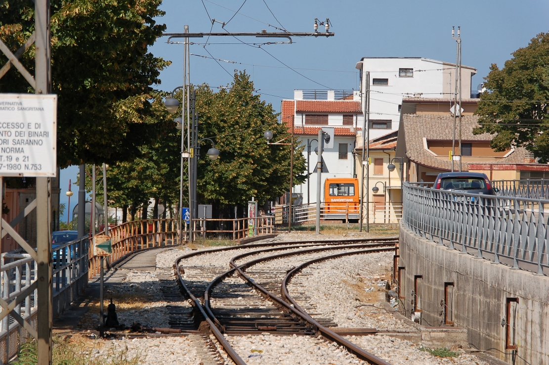 Stazione ferroviaria di San Vito Città, sul vecchio tracciato della ferrovia Sangritana oggi abbandonato